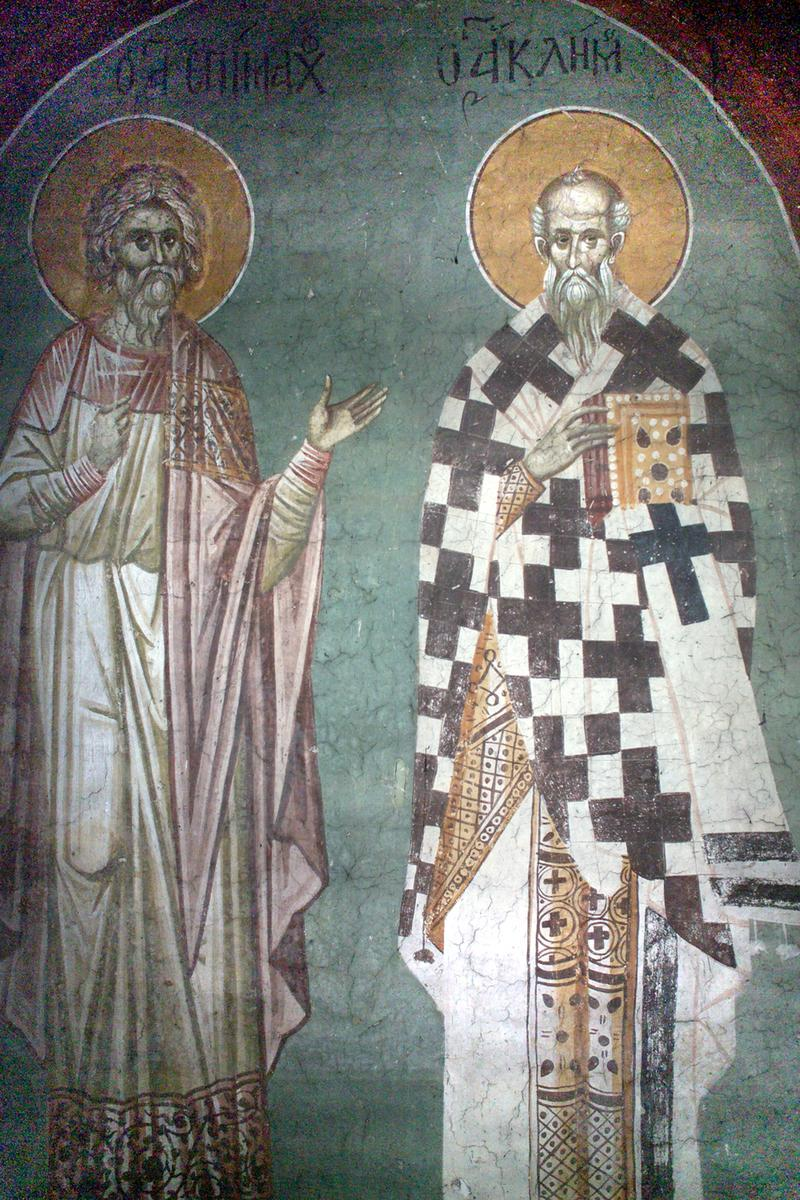 Epimachus (à gauche) et le pape Clément I. Peinture murale au monastère Gracanica au Kosovo